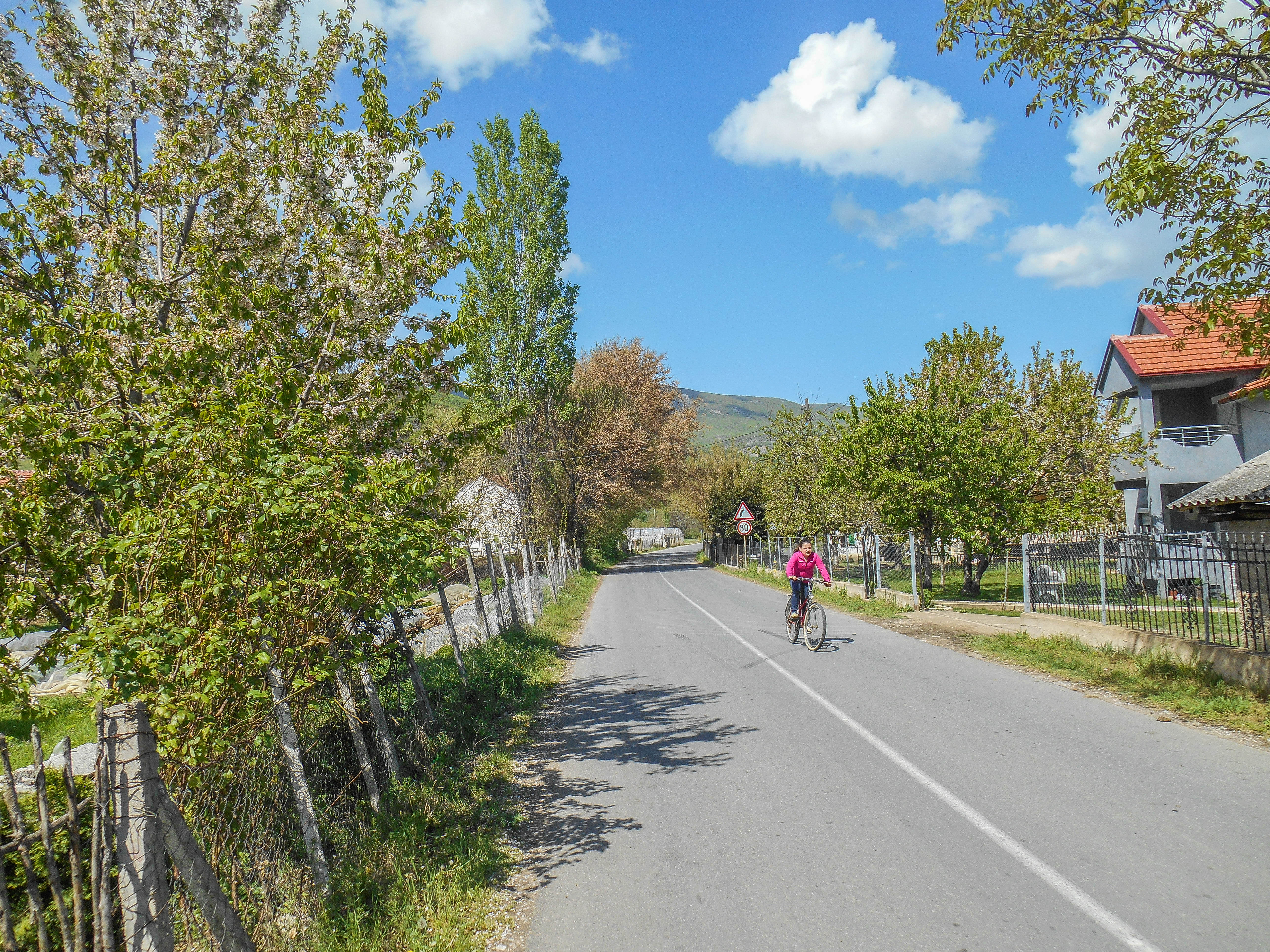 Водоча